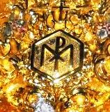 Escudo simplificado que aparece en la delantera del paso del Cristo de las Almas